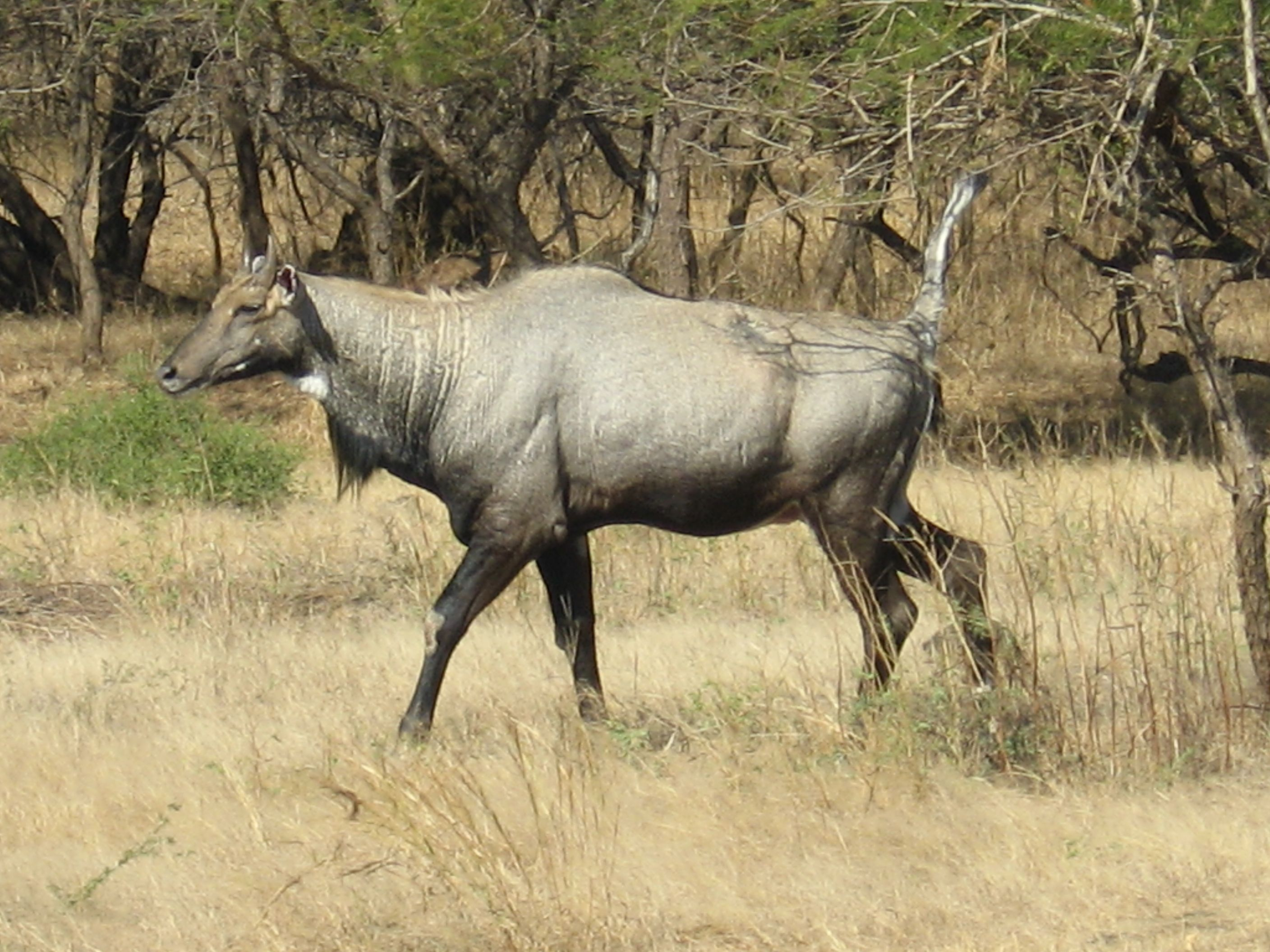 ஆண் நீலான், கிர் காடுகள், குசராத் இந்தியா